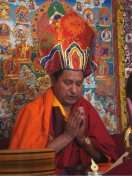 Rinpoche lors d'un rituel